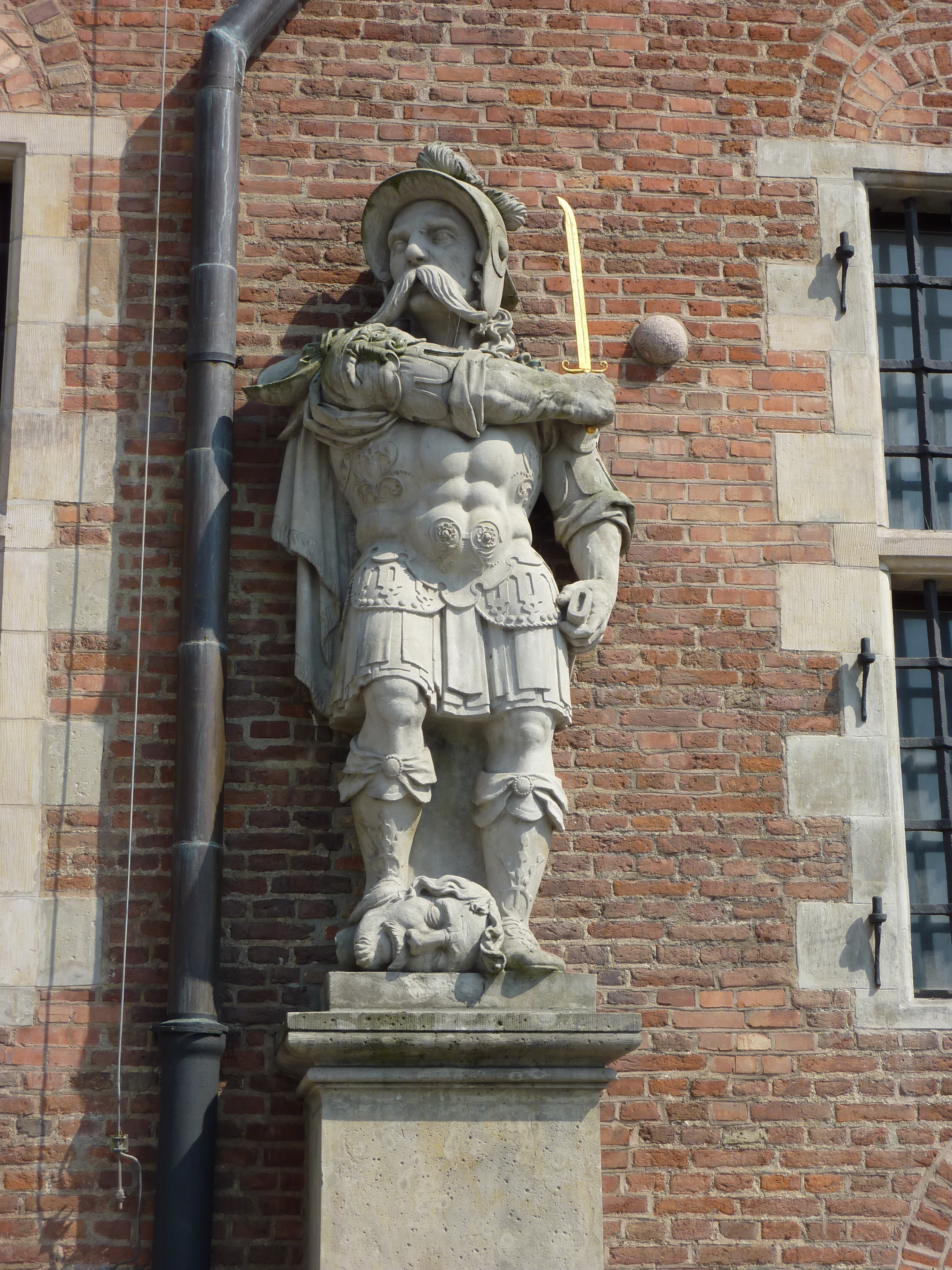 Gdańsk, Wielka Zbrojownia, strona od Targu Węglowego. Figura Kozaka z obciętą przezeń głową Iwana Podkowy.